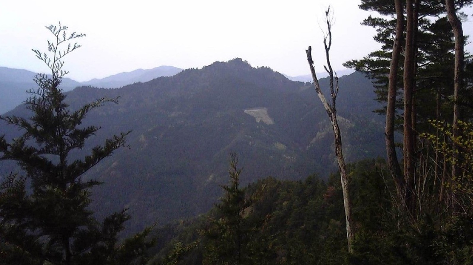 焼山寺山の中腹にお寺がある。